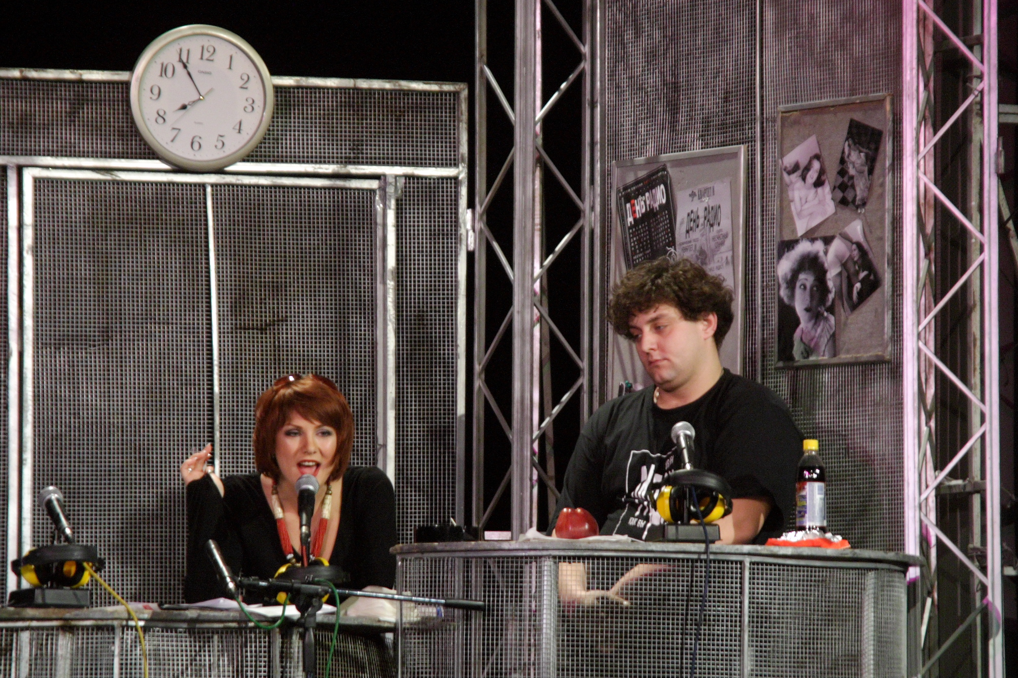 Спектакль «День радио». Опоздавшая Оля приветствует радиослушателей. Ольга Кузина (Оля), Михаил Полицеймако (Макс). 6 января 2005 года, ДК им. Зуева, Москва.